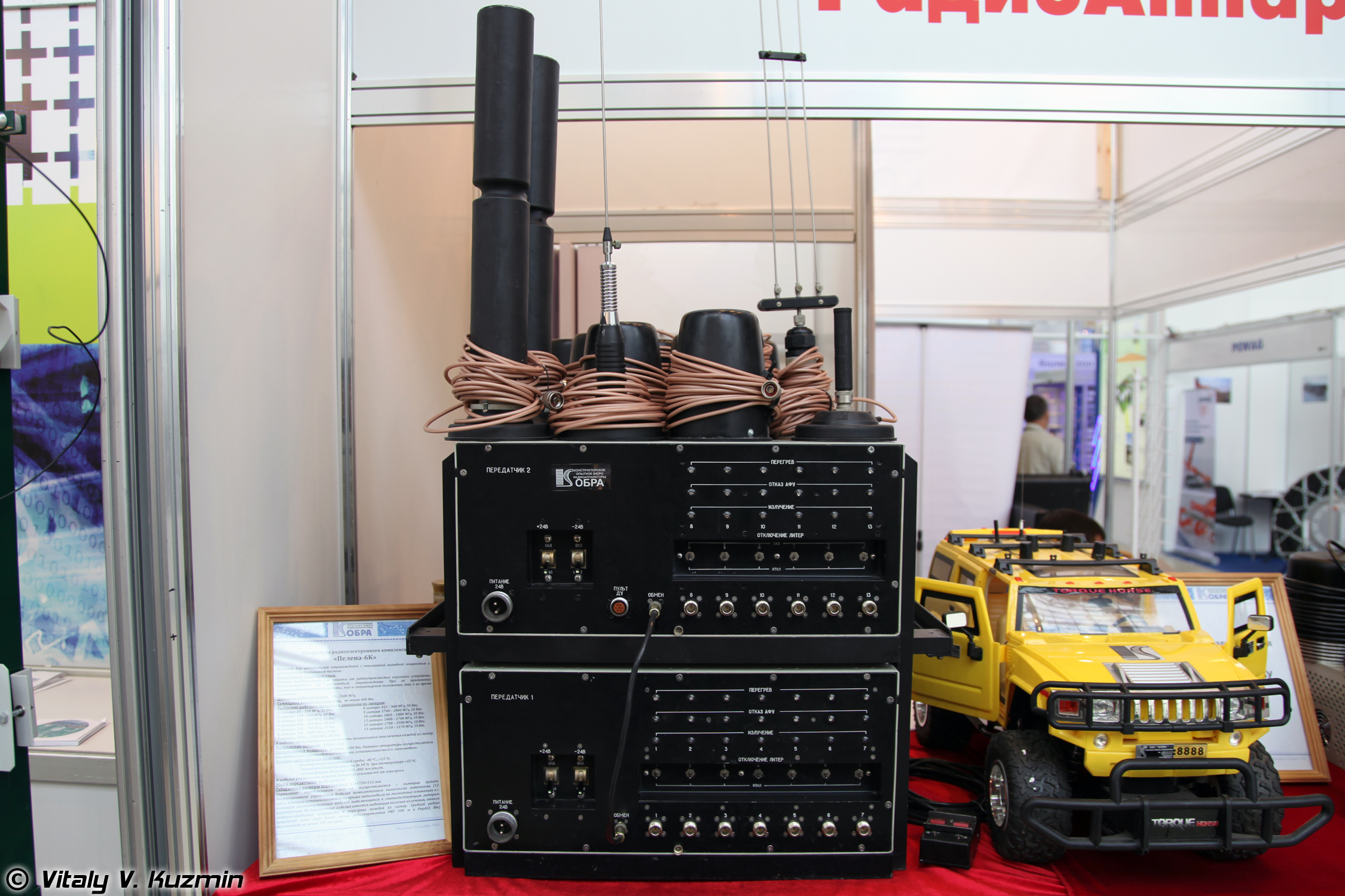 Блокиратор Пелена-6К (Jamming device Pelena-6K)